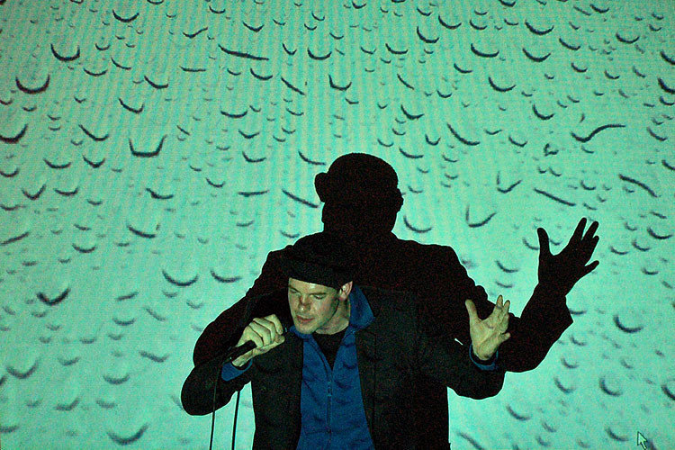 Bas Böttcher live in Wrocław